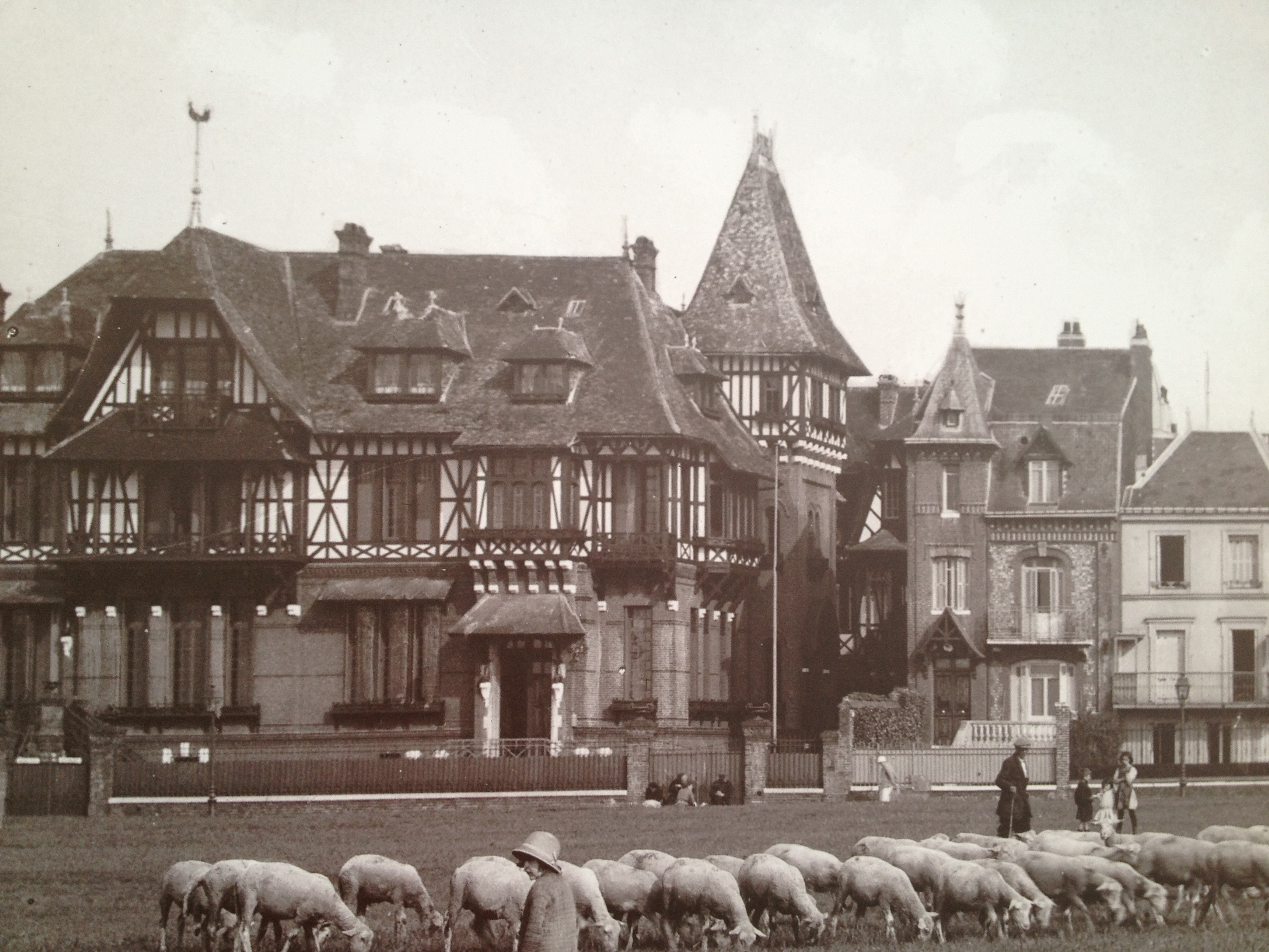 Manoir Saint Martin et ancienne villas (rasées dans les années 1973-1977)